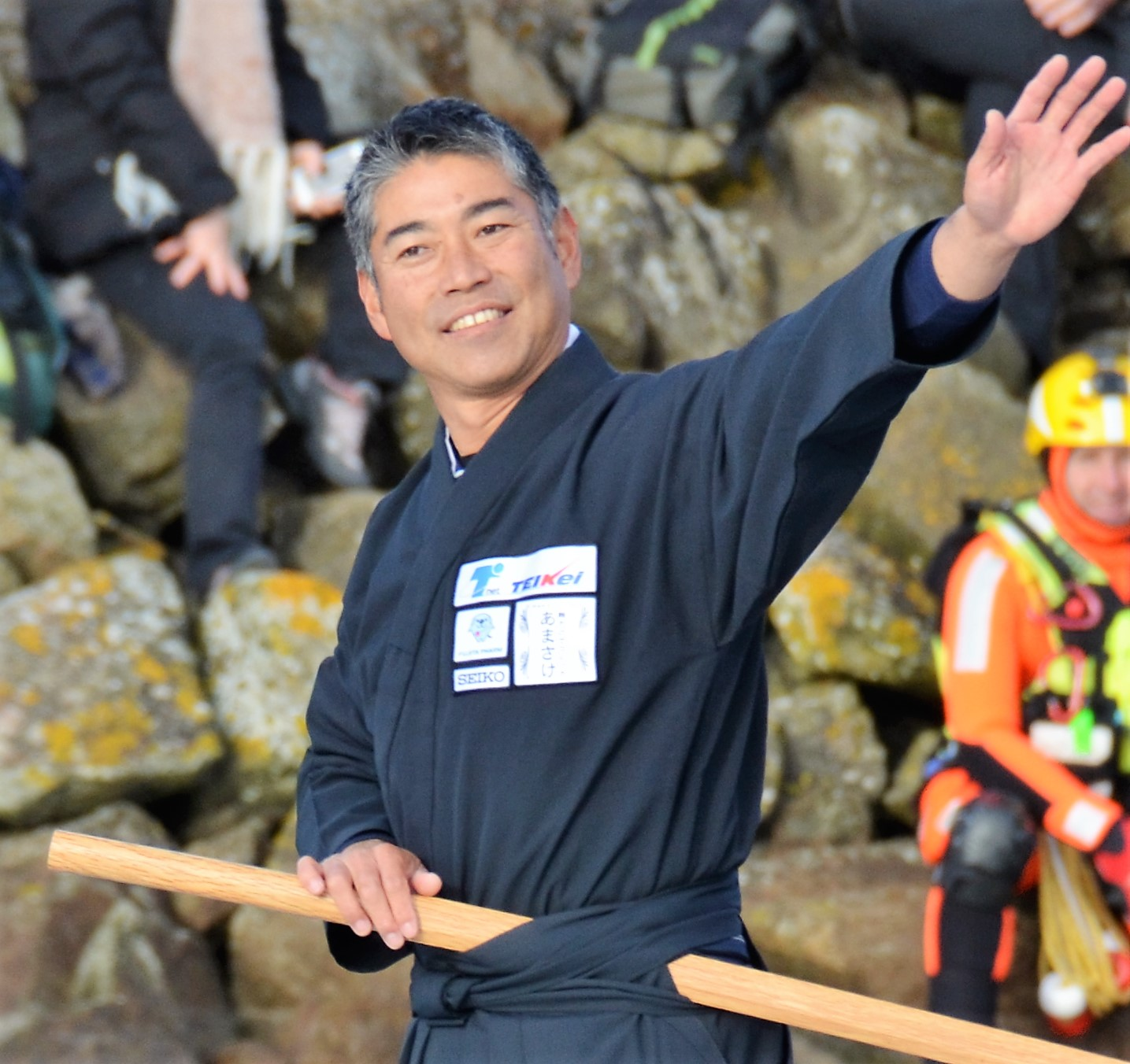 Kojiro Shiraishi au départ du Vendée Globe 2016-2017